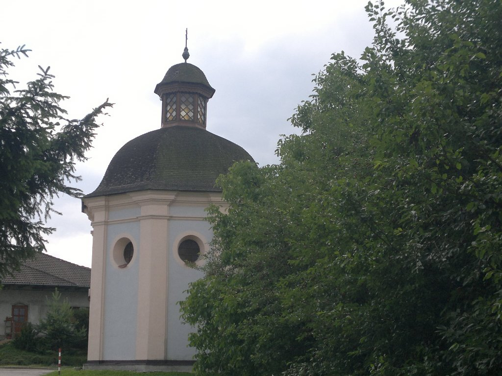 Křížová cesta - 25 zastavení (Římov), Dolní Římov, Římov